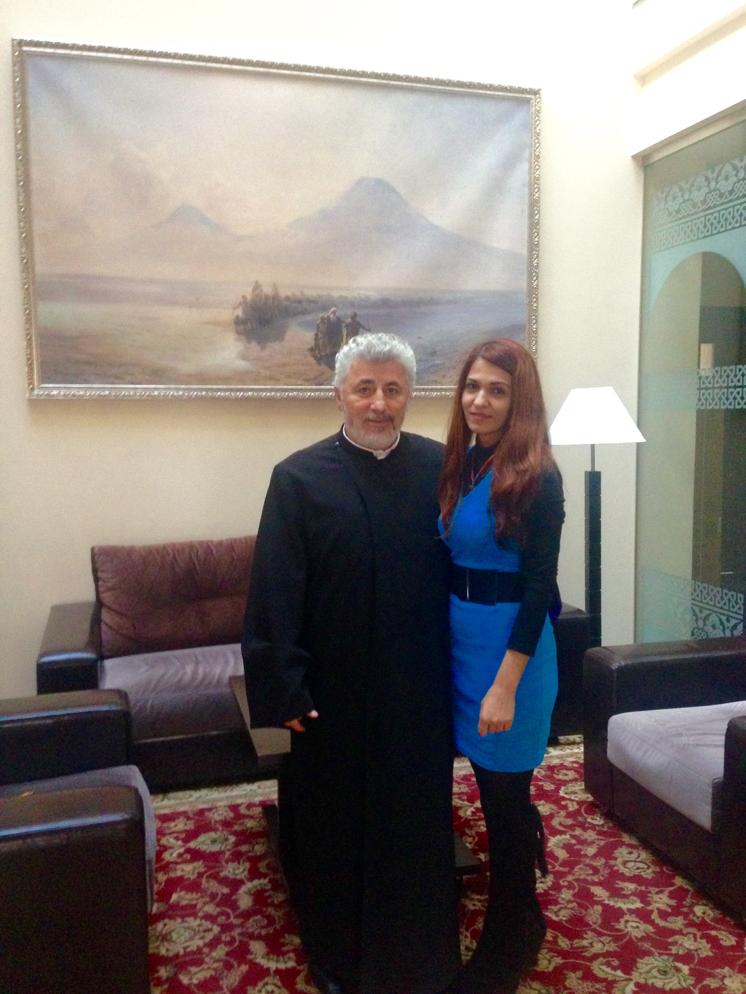 Նելլի Դանիելյանը Եզրաս արքեպիսկոպոս Ներսիսյանի հետ